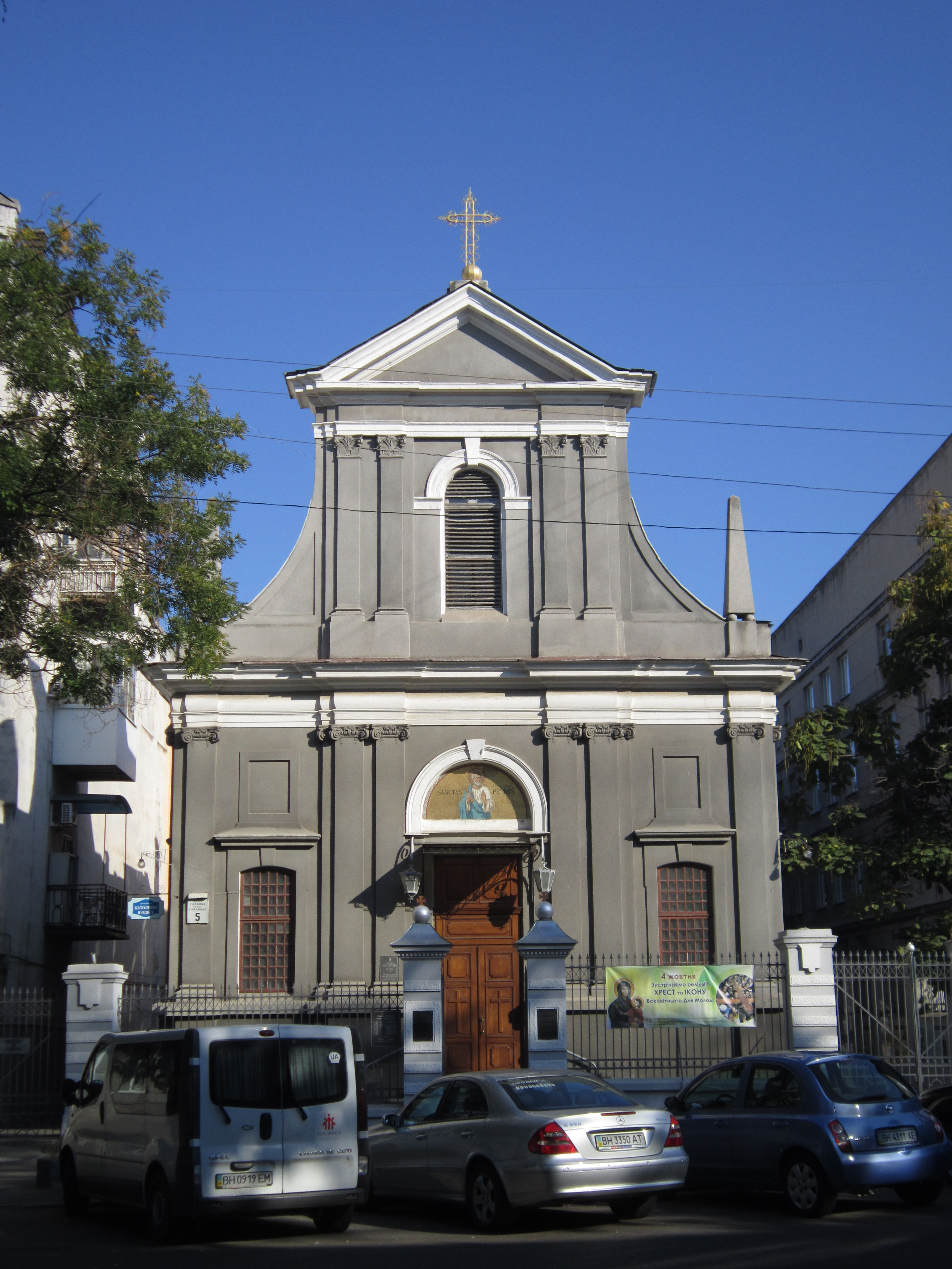 Костьол св. Петра, Одеса, Гаванна вул., 5